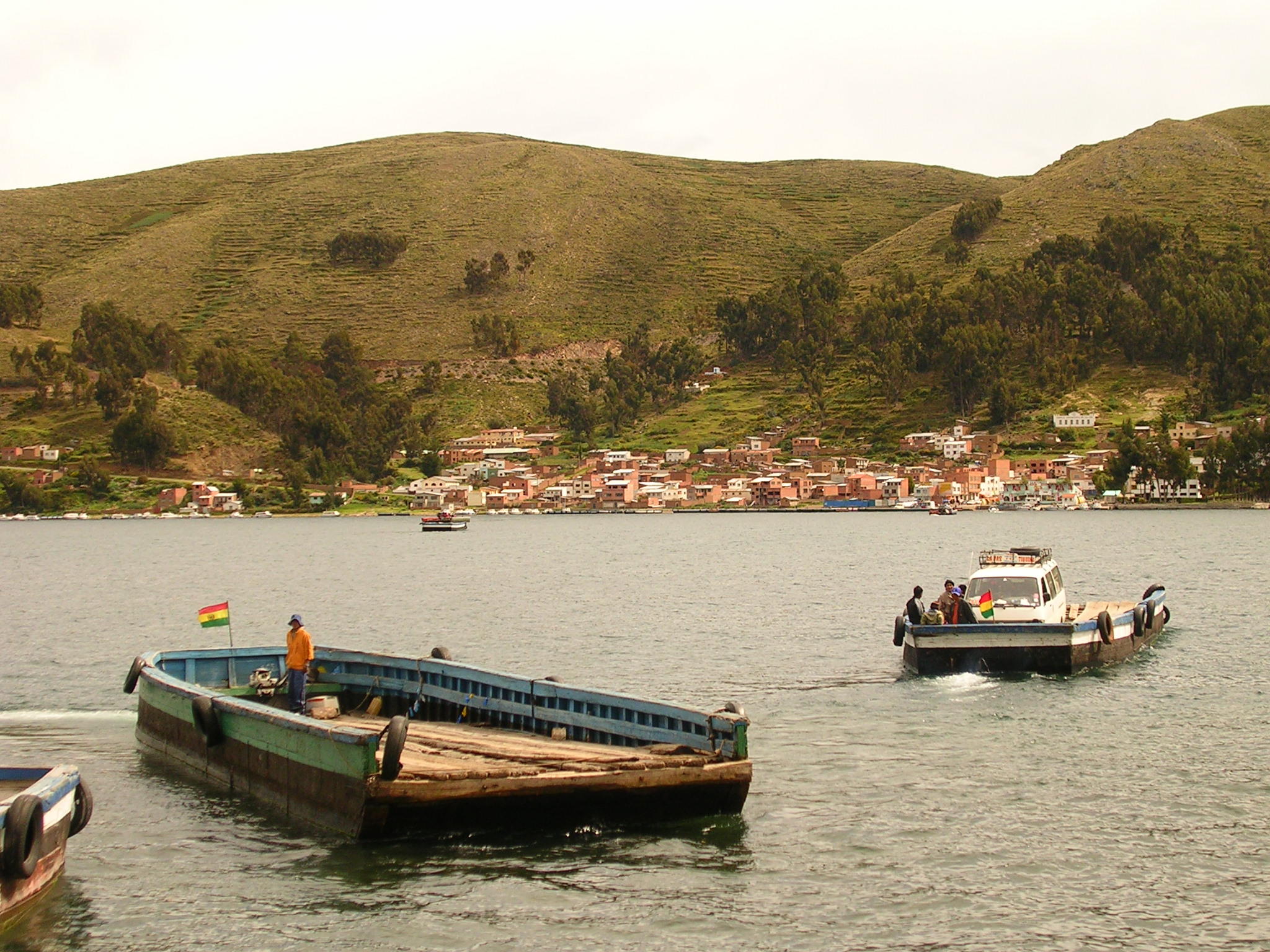 Barcazas cruzando el estrecho de Tiquina en el lago Titicaca